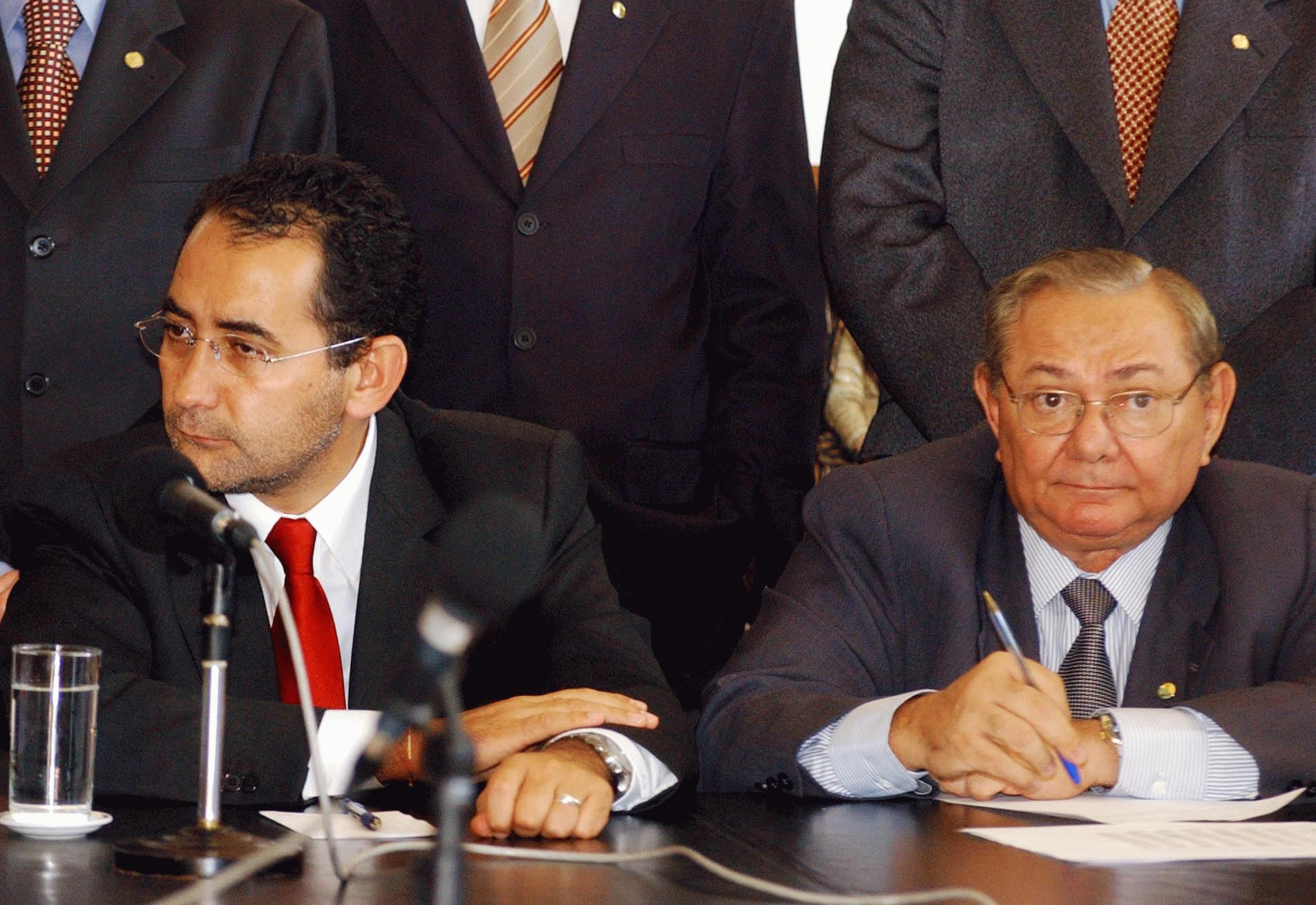 Os políticos brasileiros João Paulo Cunha e Mussa Demes.